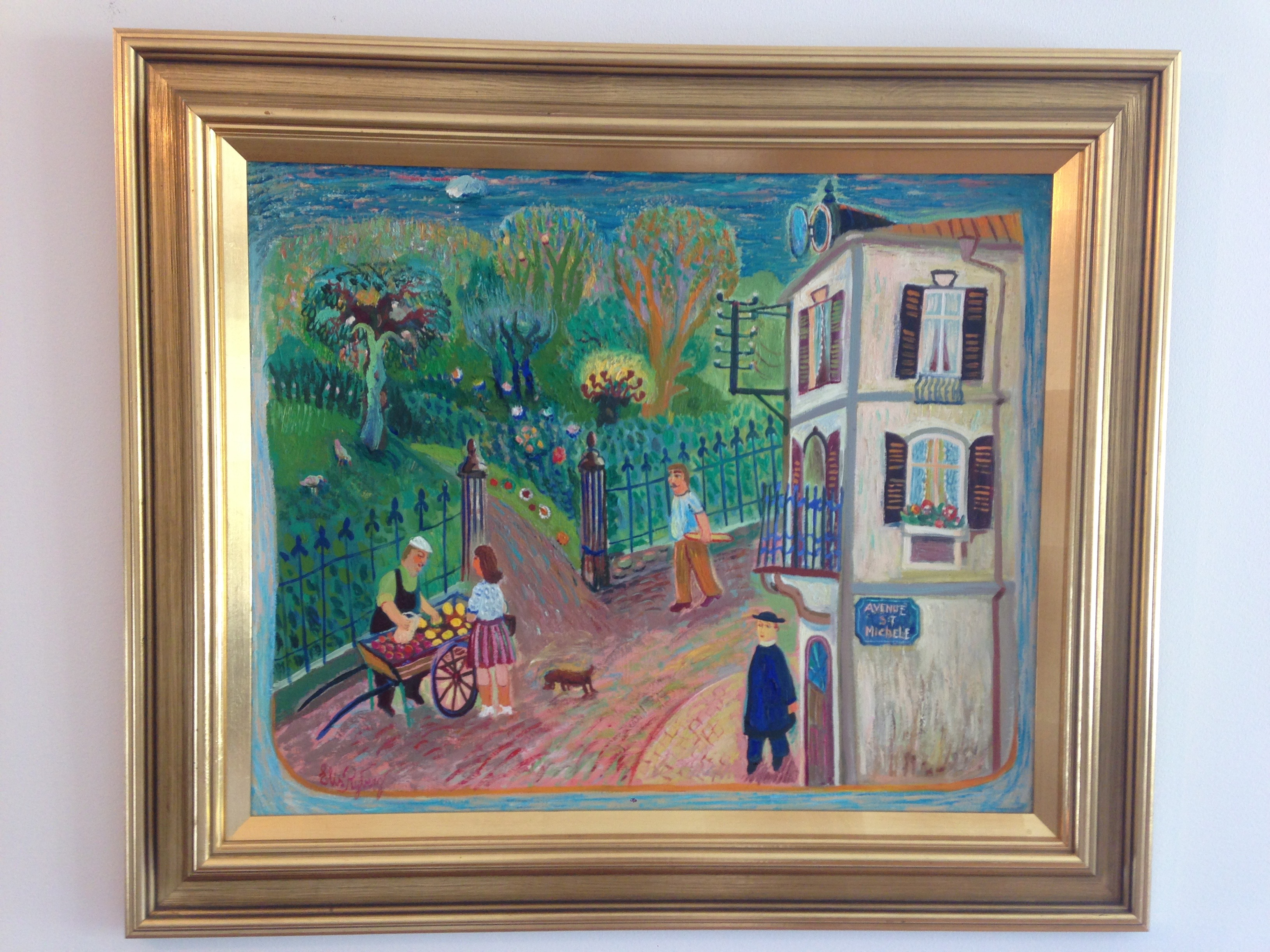 Elis Ryberg, "Från Remiremont", olja på duk 51x61 cm.